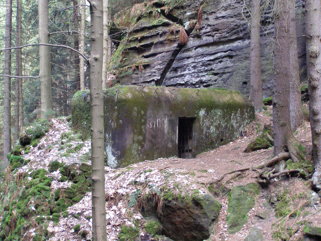 BöhmischeSchweizDürrkamnitzBunkerAbwärtsblick2008